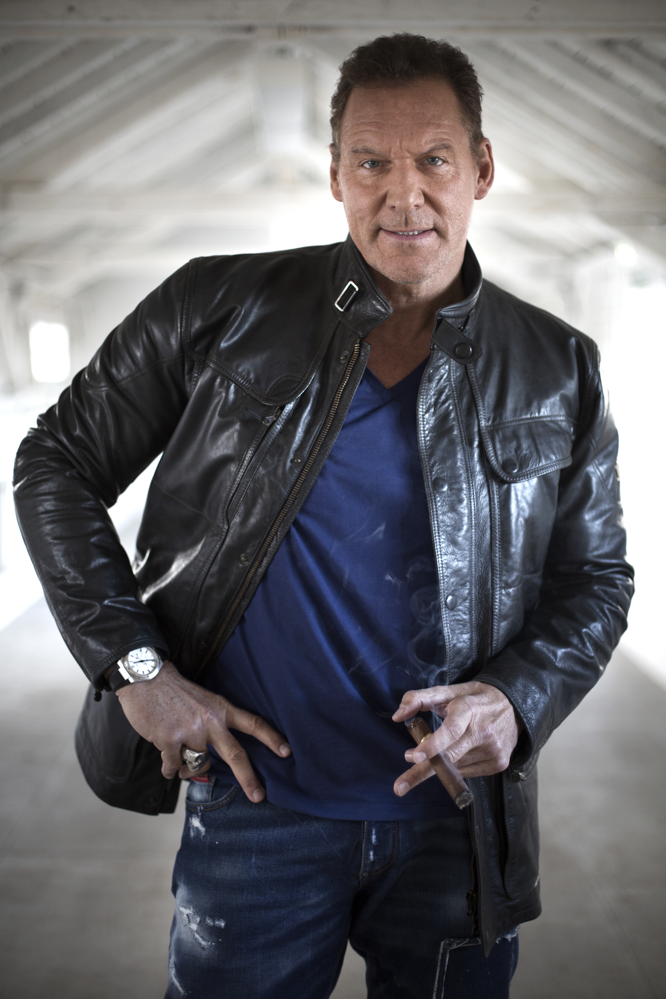 Ralf Moeller (Februar 2016)